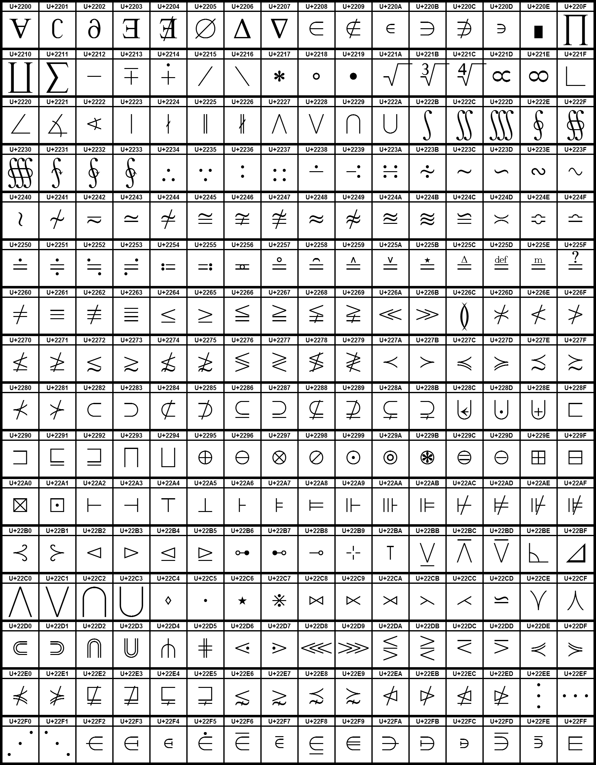 Grafiktafel für den Unicodeblock Mathematische Operatoren.